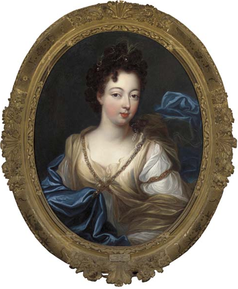 Portrait of Charlotte Aglaé d'Orléans (1700-1761)